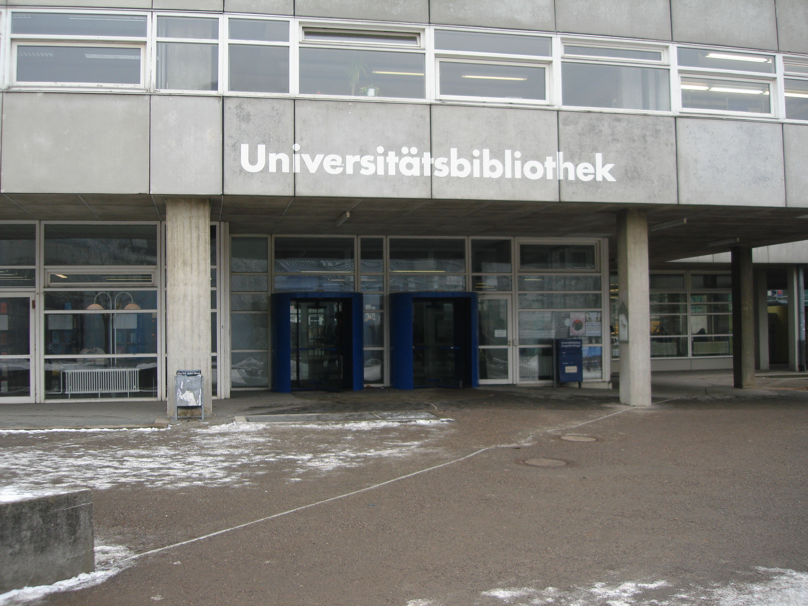 Universitätsbibliothek